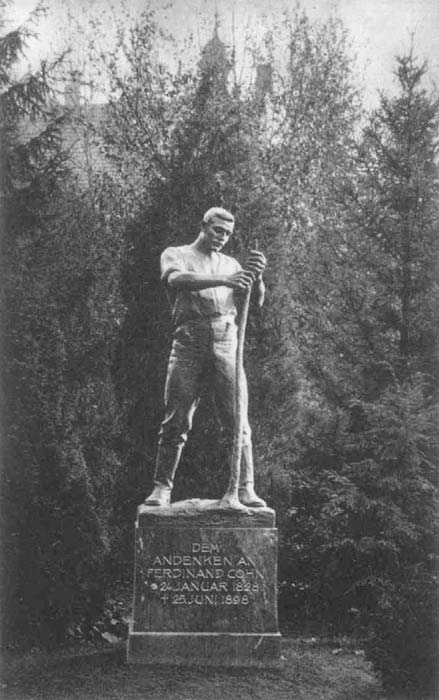 DEM ANDENKEN AN FERDINAND COHN (24 JANUAR 1828 - 25 JUNI 1898)